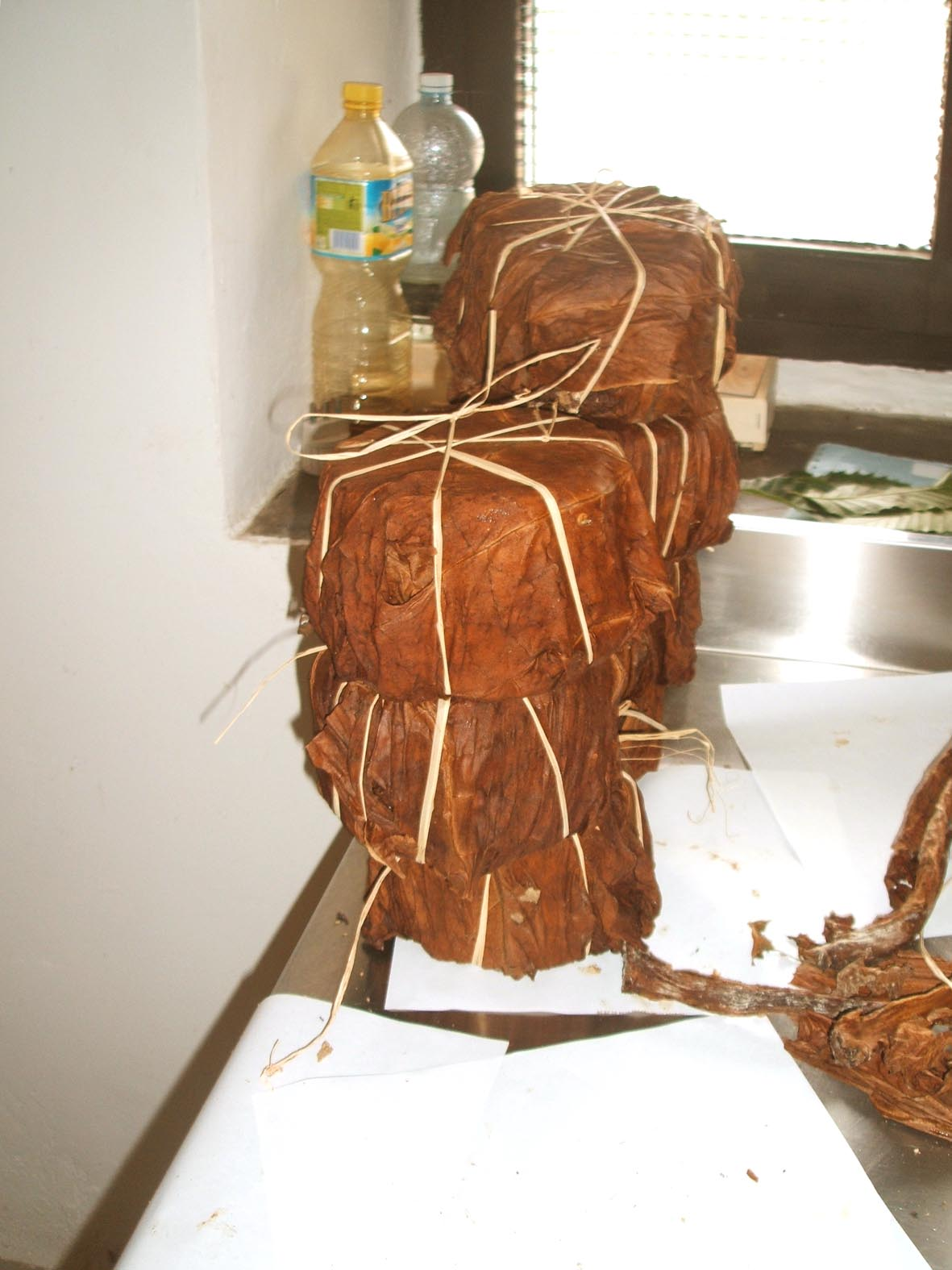 Roccaverano AT, robiola di roccaverano (cheese)